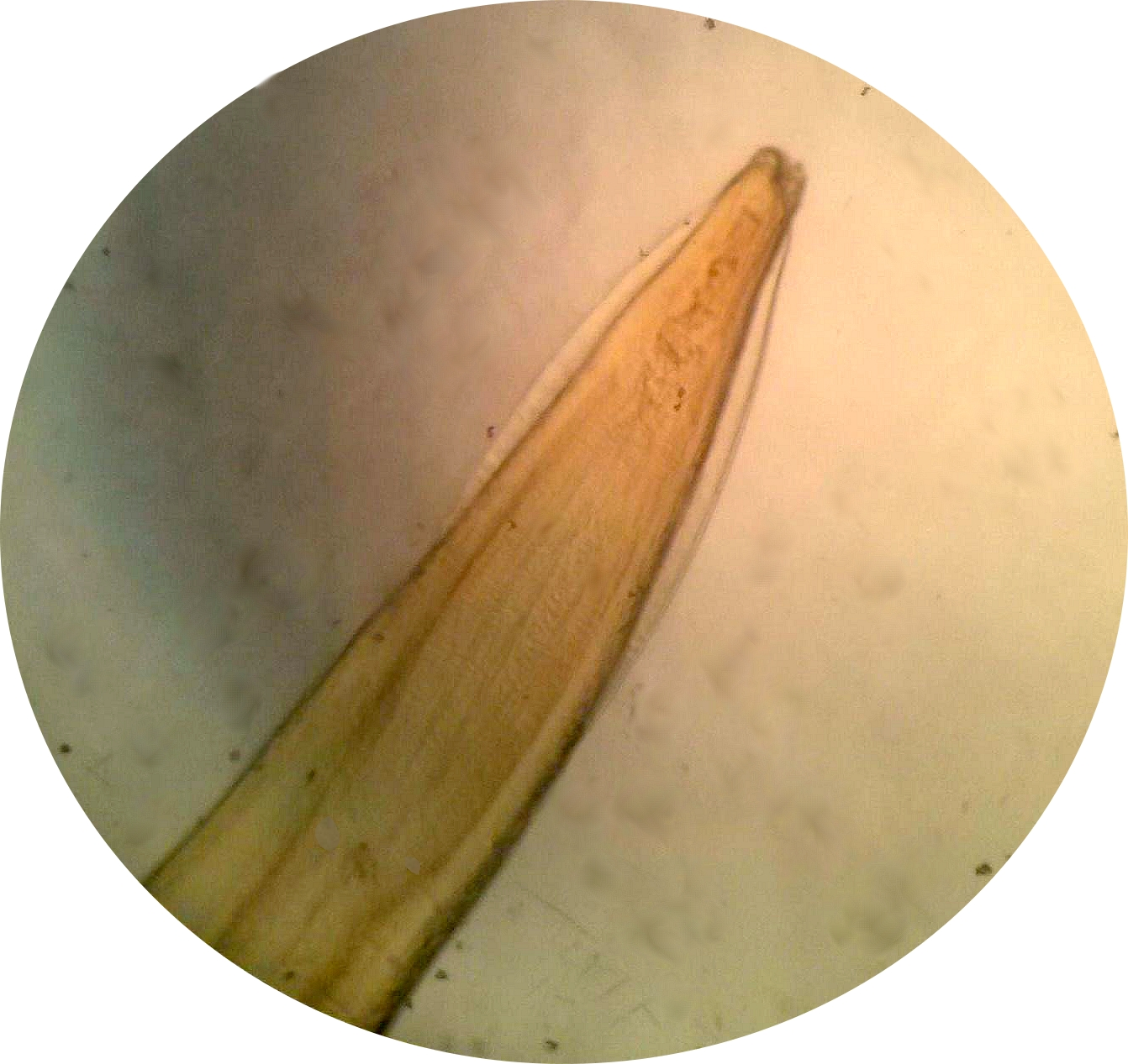 Extrémité antérieure de T. canis avec ailes cervicales en fer de lance visibles